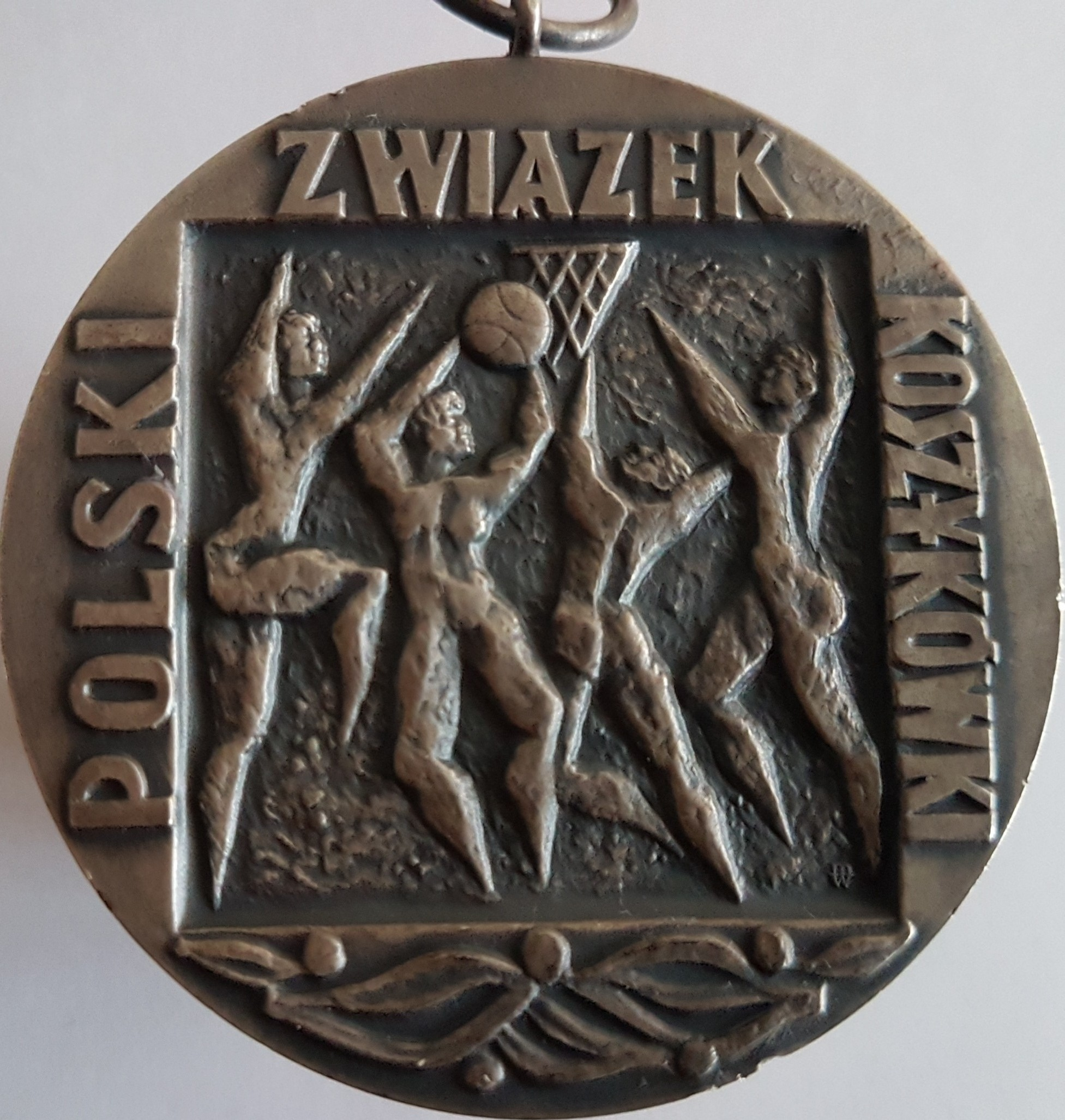 Medal dla Spójni za II miejsce od PZKosz (1997)